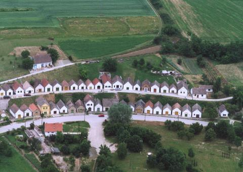 Villánykövesd, Hungary, aerialphotography